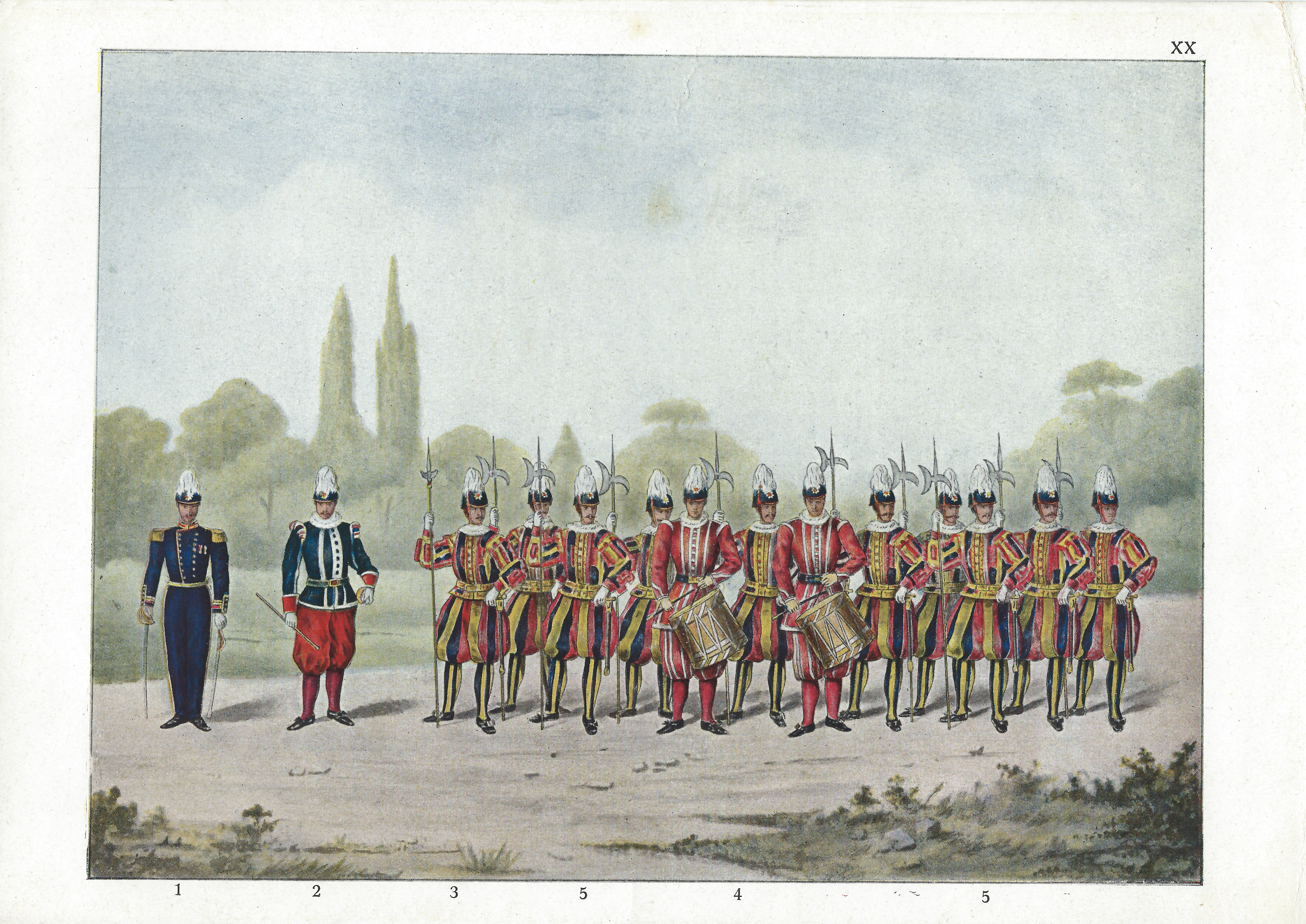 1 ufficiale col gradi di capitano 2 sergente 3 caporale 4 tamburi 5 guardie